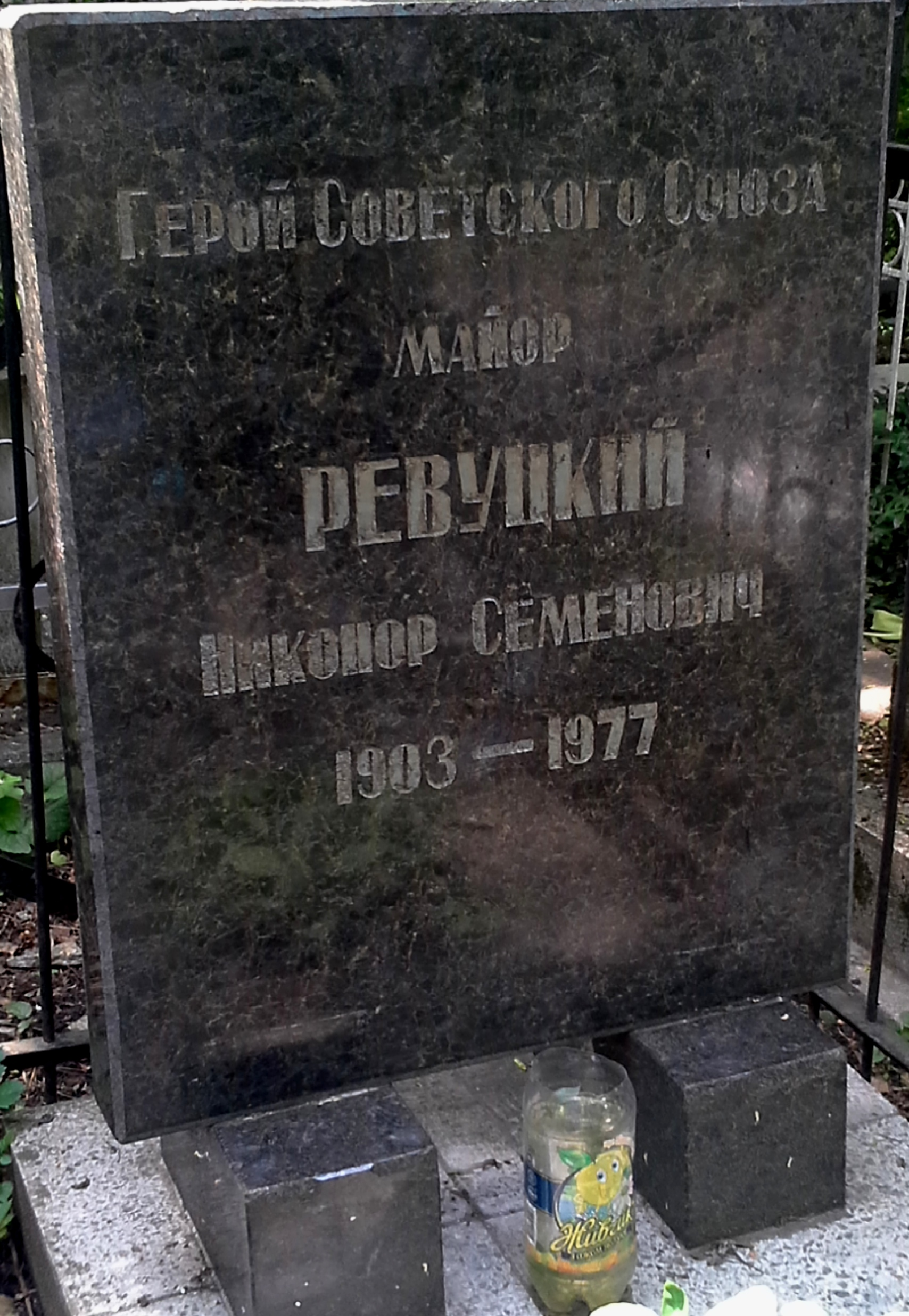 Памятник Герою Советского Союза Н.С. Ревуцкому на могиле (2-е Христианское кладбище Одессы)